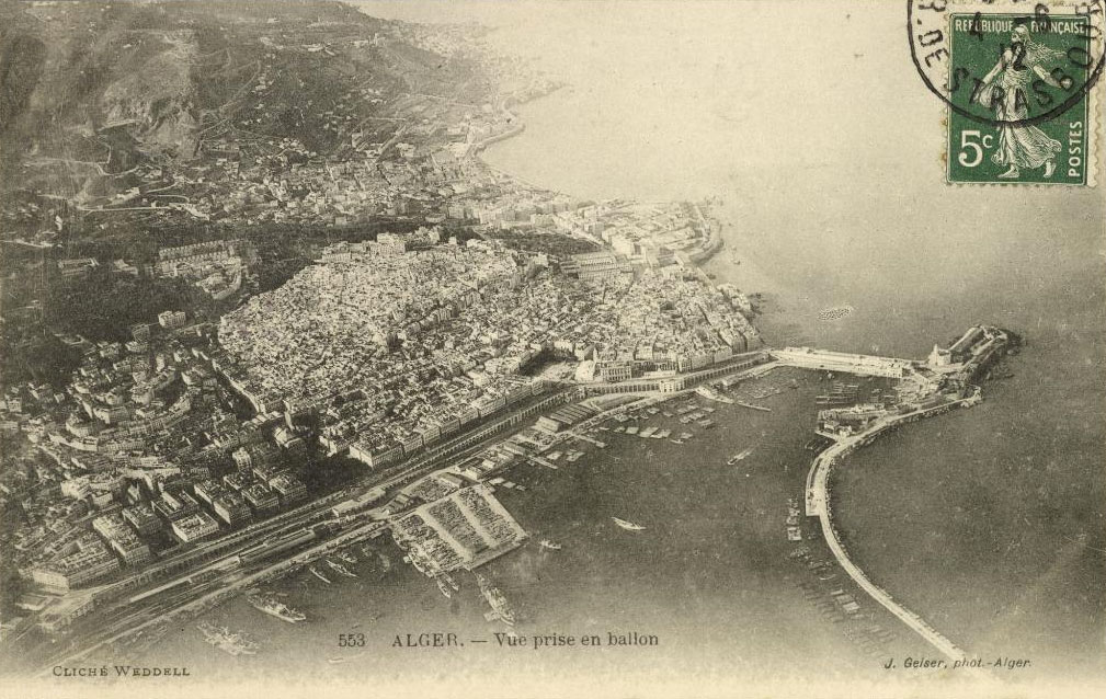 carte postale d'Alger, département français en 1912. Postcard of Algiers, June 4, 1912 Creator: Jean Geiser (1848-1923) Date: June 4, 1912 Accession number: ZPC2 A1A4 Featured in the exhibition, Walls of Algiers: Narratives of the City , May 19 - October 18, 2009 at the Getty Research Institute. Part of the "Cities and sites postcard collection" in the Getty Research Institute Library's special collections. View the library record for this collection.